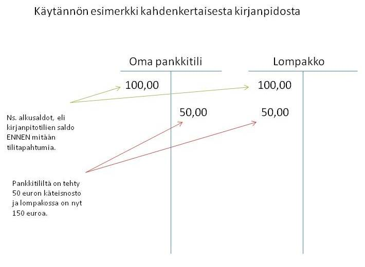 Käytännönläheinen esimerkki kaksipuoleisesta kirjanpidosta.